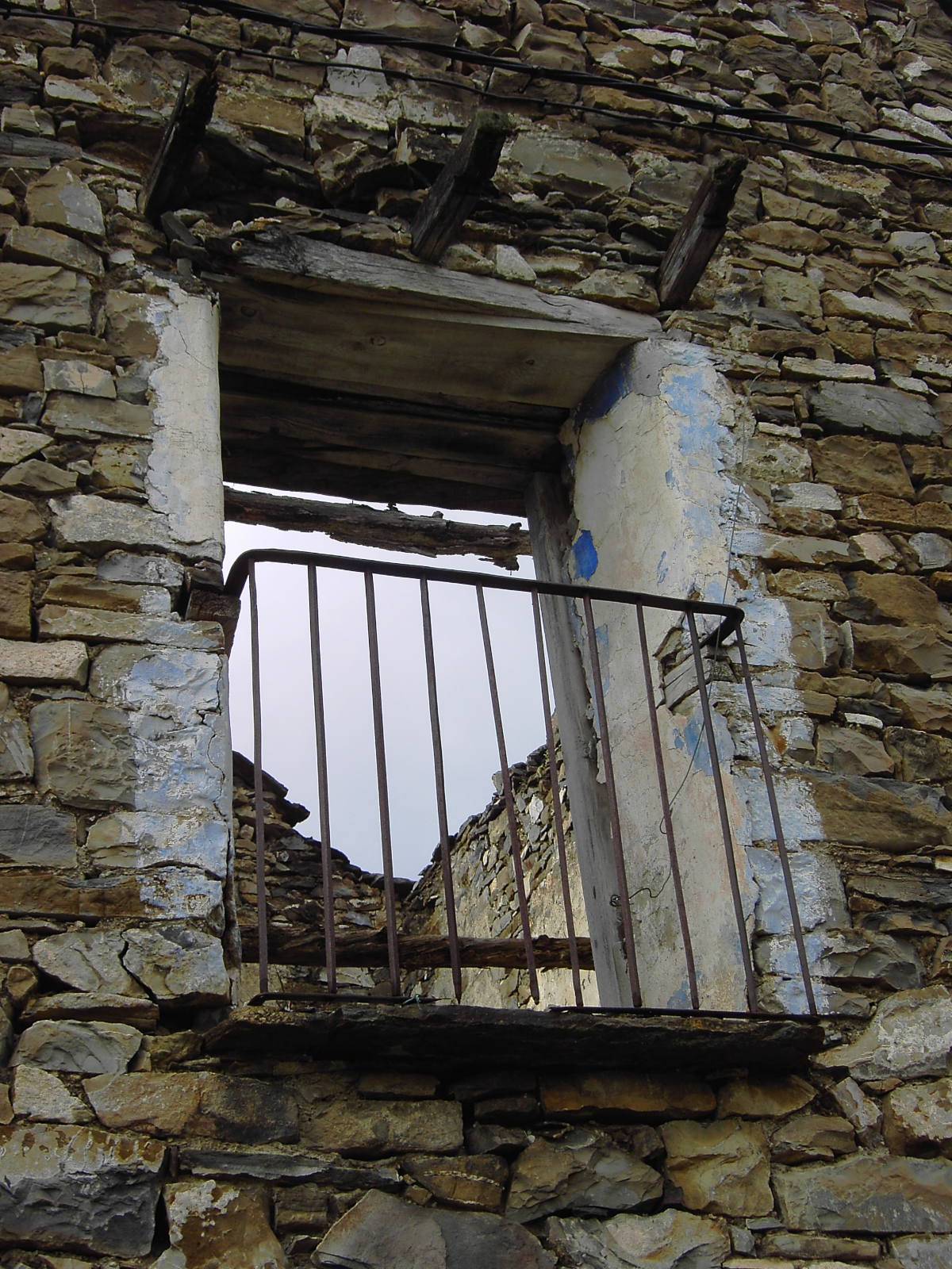 Algunas casas del lugar de Vió se han caido como consecuencia del práctico abandono de la localidad a lo largo del pasado siglo. En la imagen, un balcón de una casa cuyo tejado hace ya años que se vino abajo.